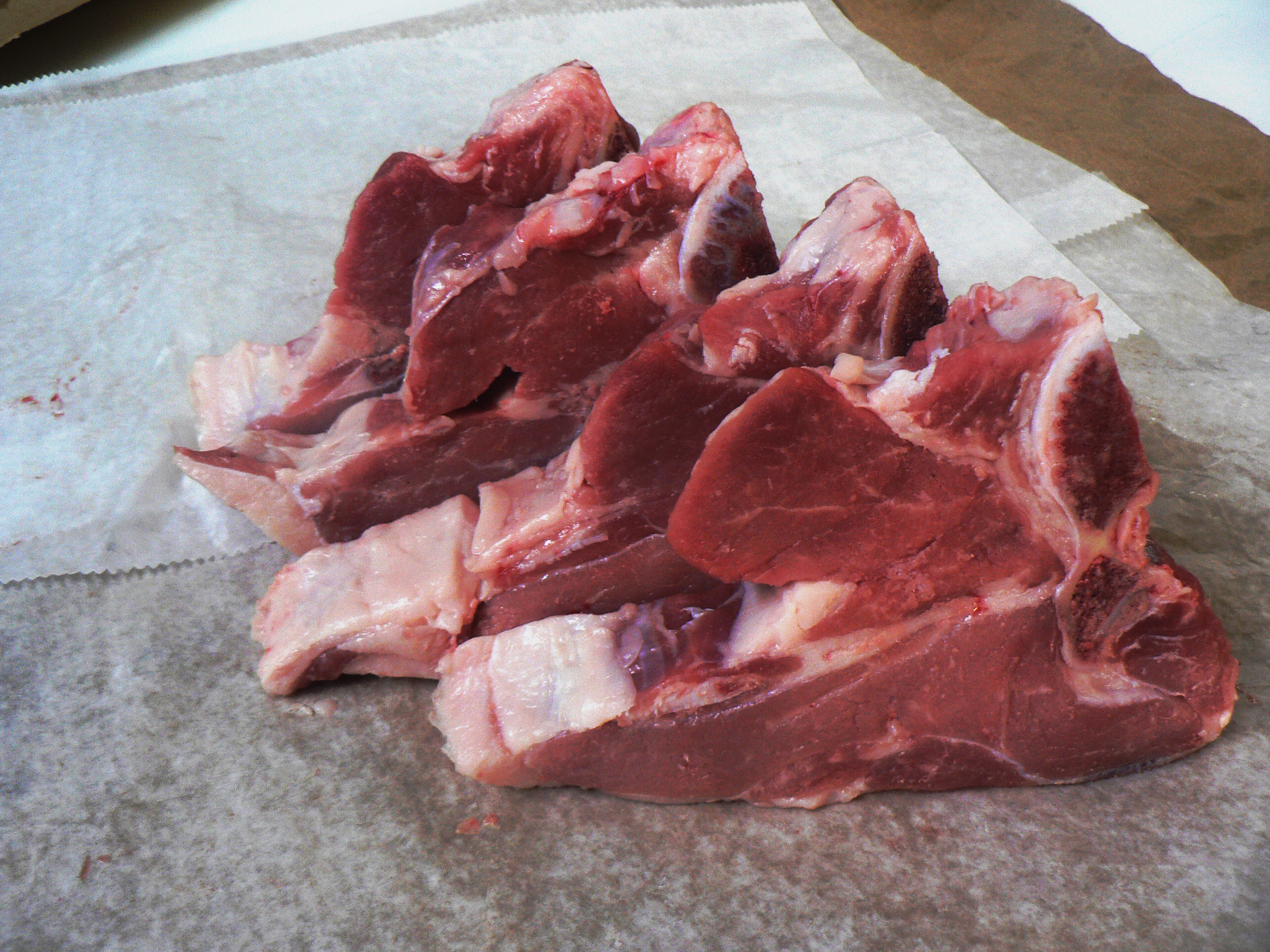 Côtes de veau